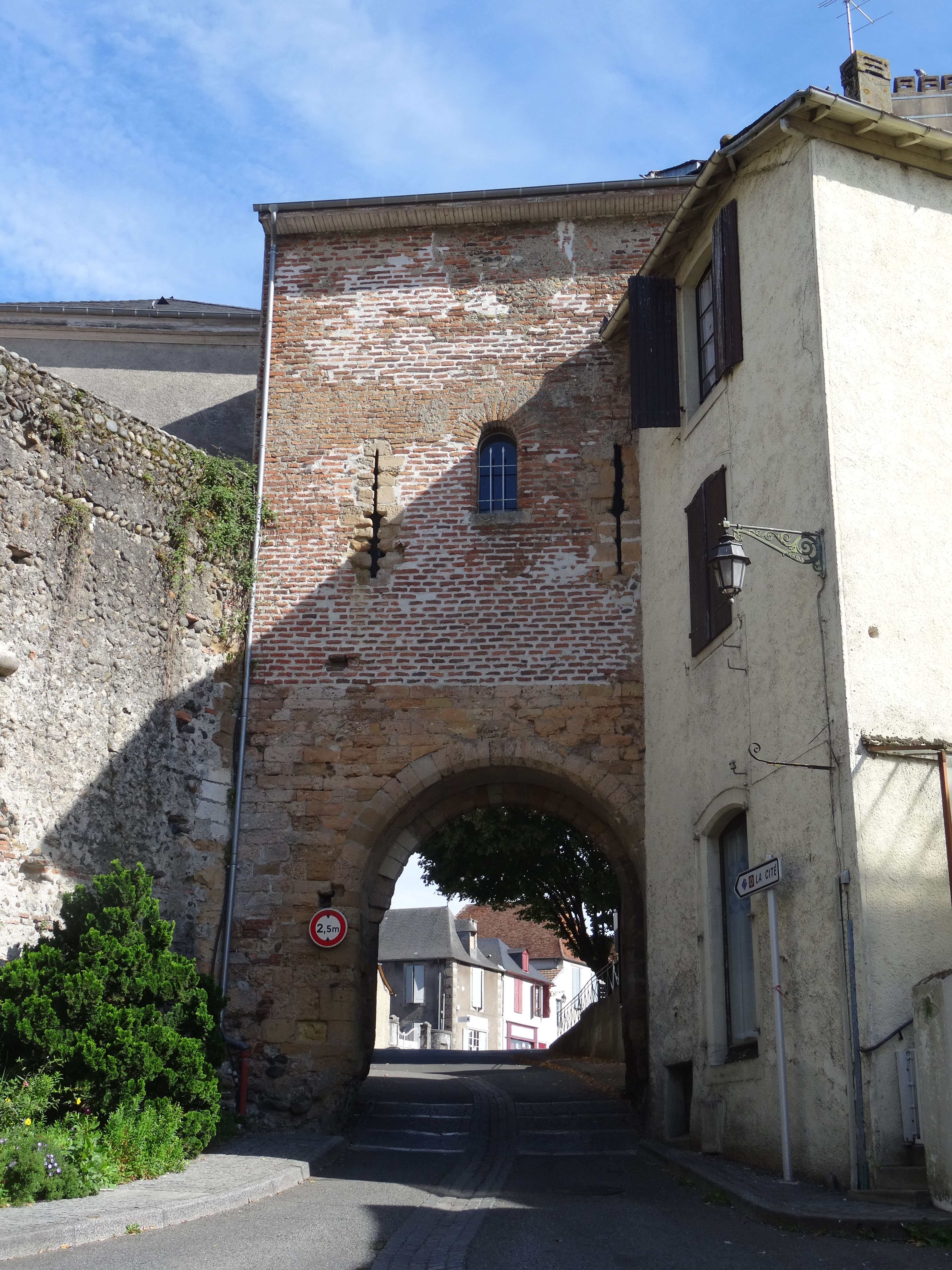 Porte d'entrée de la cité de Lescar